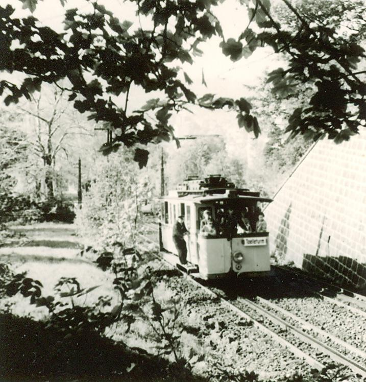 Barmer Bergbahn 1955 Fotograf: Hans Kadereit --ka 12:21, 20. Jul. 2007 (CEST) Selbst fotografiert Aufgenommen mit Photavit 24 x 24 Aufnahmedatum 06/1955